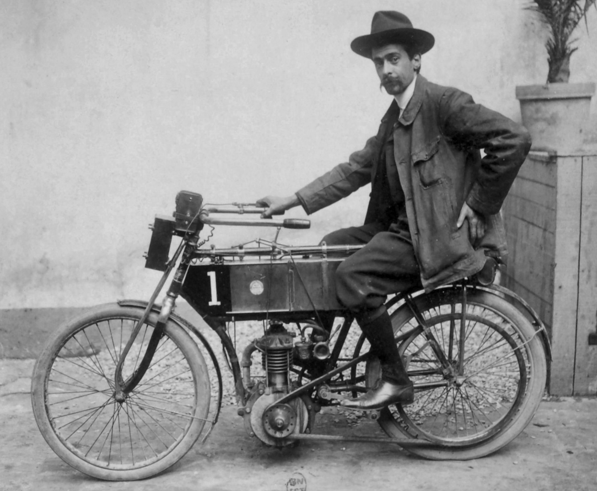 Mauger sur motocyclette Lamaudère-Mauger 330 ccm